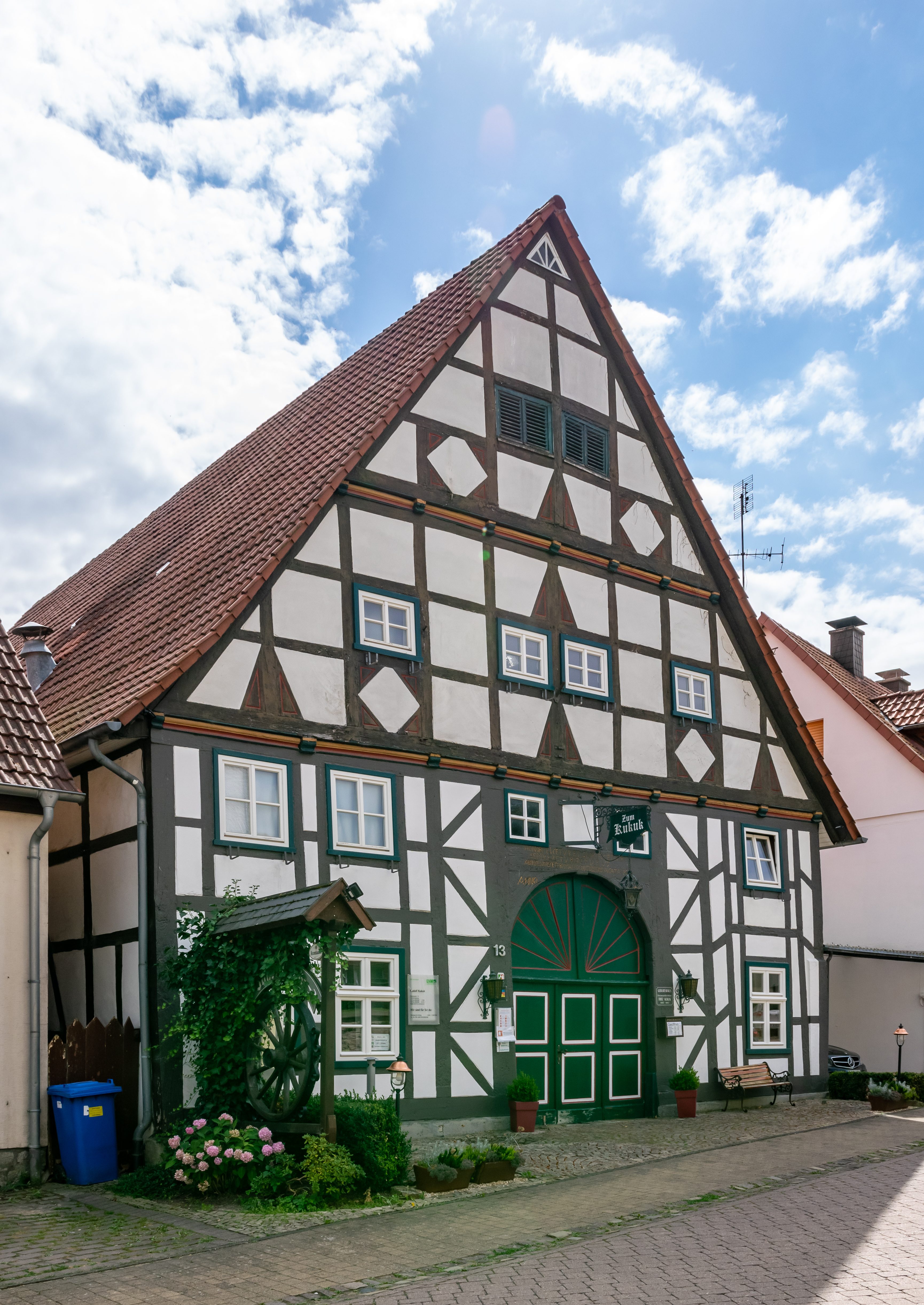 Haus Zum Kukuk in Nieheim-Himmighausen, Geburtshaus von Fritz Kukuk